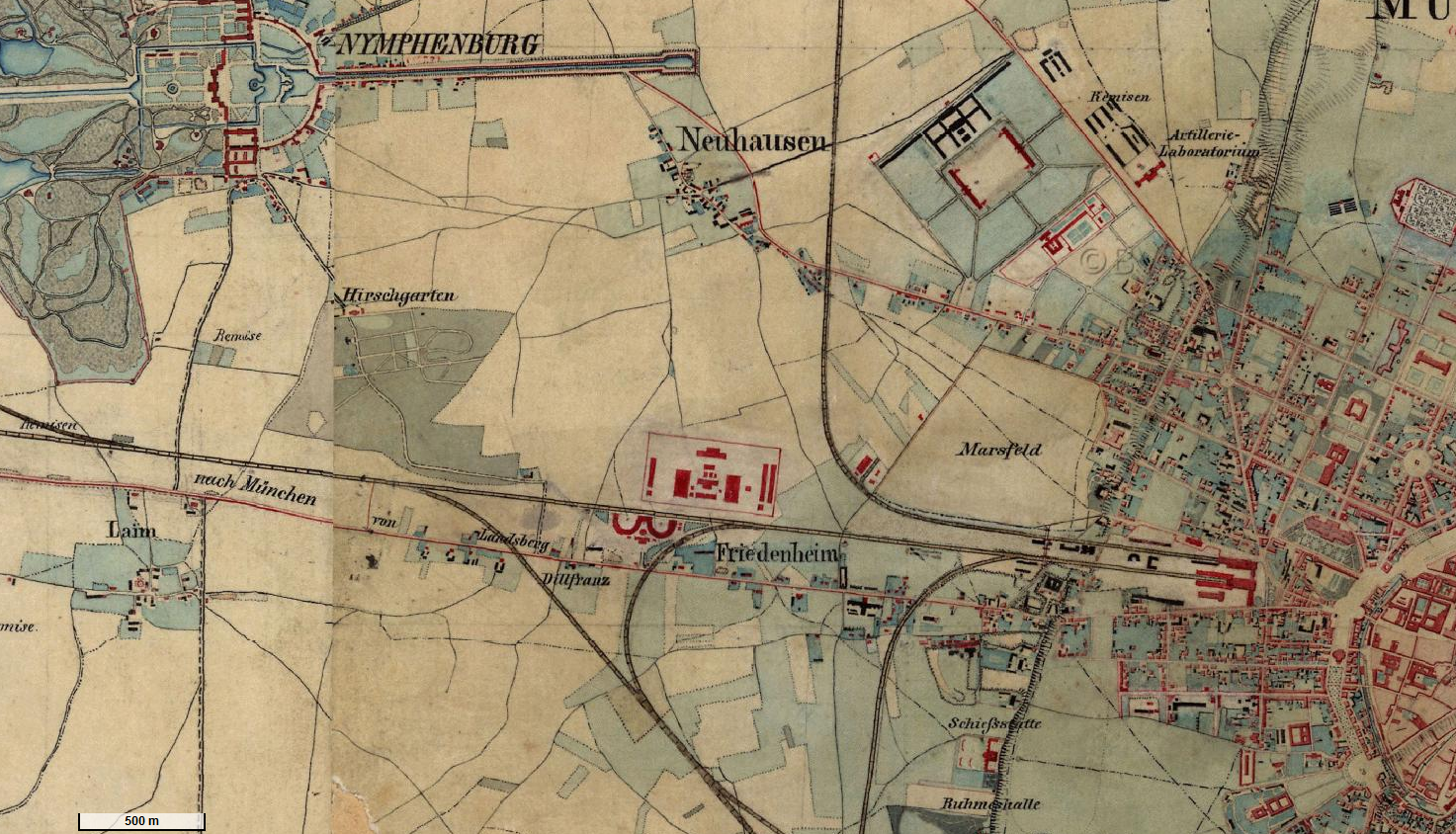 Ausschnitt der Urpositionsblätter 691 Pasing und 692 München von 1856, zeigt den früheren Münchener Ortsteil Friedenheim südlich von Neuhausen und östlich von Laim und westlich des Münchener Hauptbahnhofs